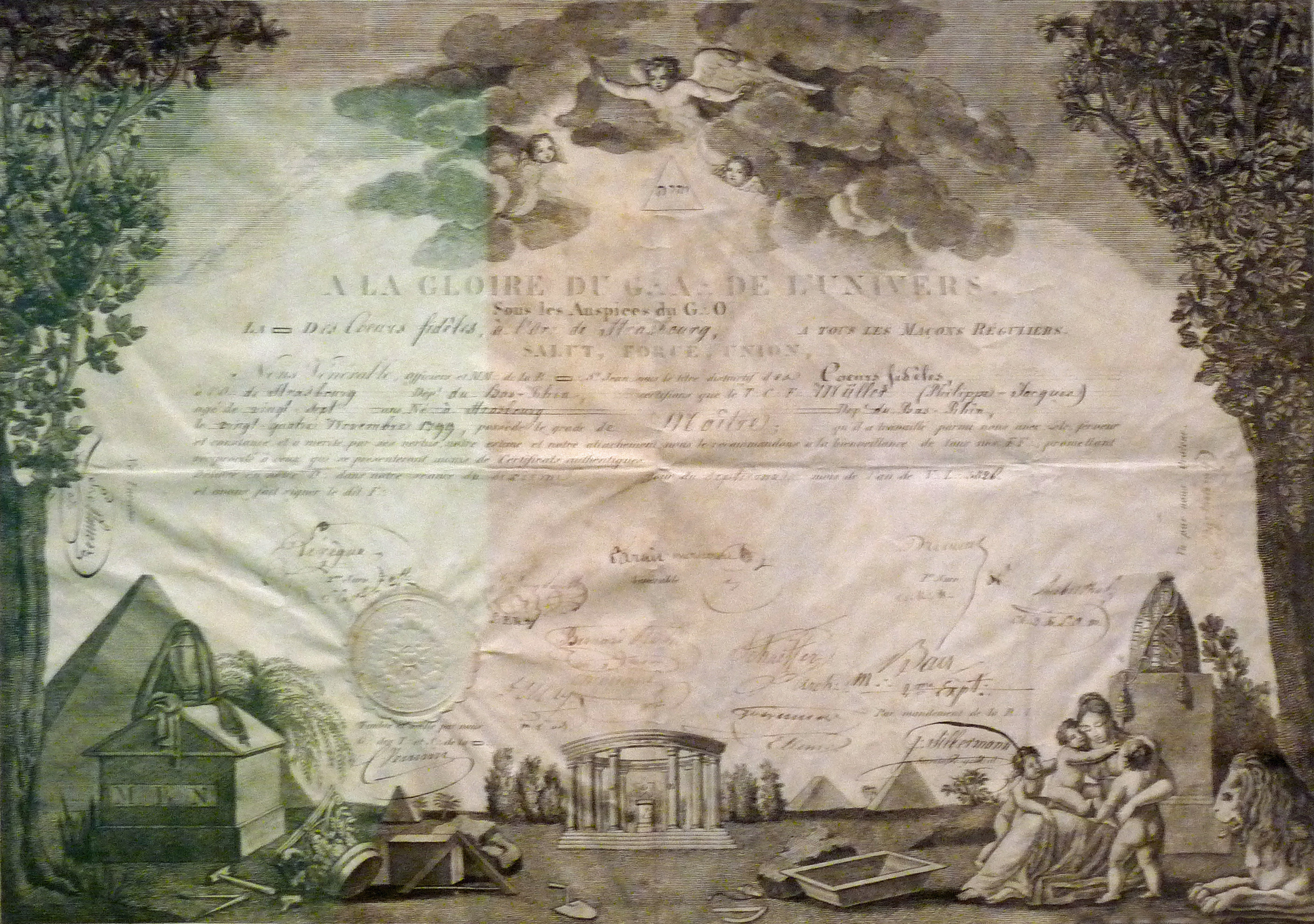 Franc-maçonnerie à Strasbourg : Certificat de maître délivré en 1826 par Les Coeurs Fidèles à Philippe Jacques Müller, âgé de 27 ans, né à Strasbourg en 1799 (gravure à l'eau-forte et au burin sur parchemin)